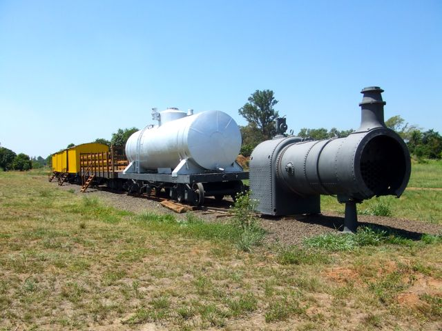 Formación en exposición al lado de la estación de Carmen del Paraná (actualmente transformada en museo).